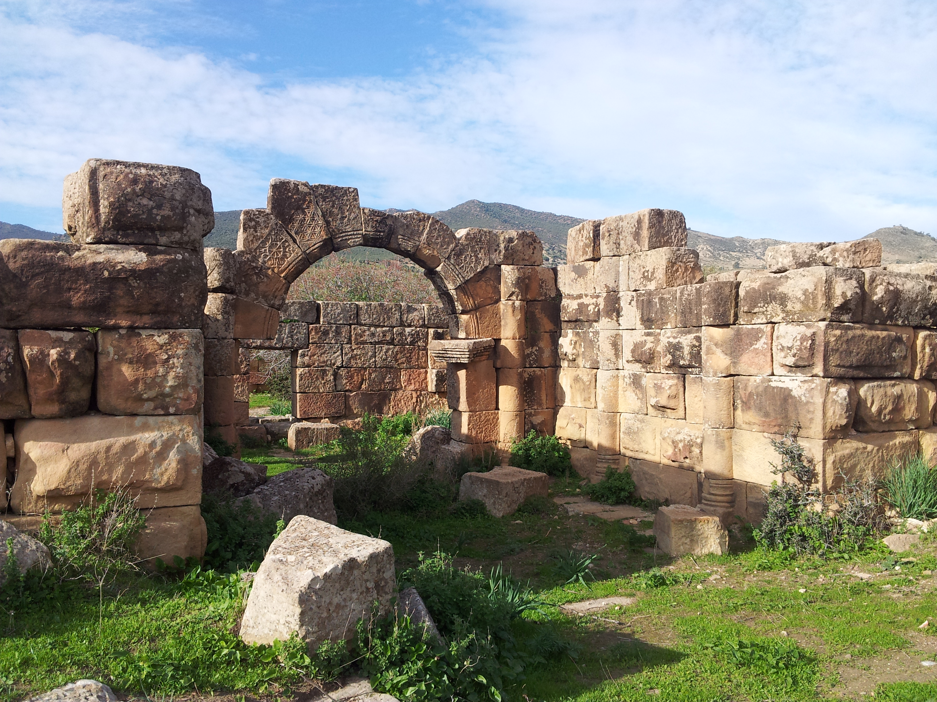 Ruines romaines de Ksar El Kaoua (Ammi Moussa. Algérie).